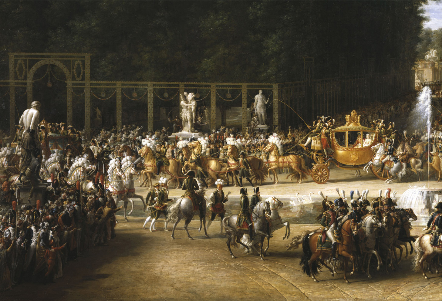 Etienne-Barthélémy Garnier (1759-1849): Le Cortège du mariage de Napoléon Ier et de l’archiduchesse Marie-Louise traversant le Jardin des Tuileries, le 2 avril 1810 (détail, représentation allégorique).